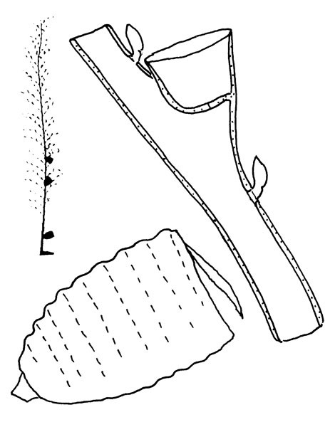 Dibujo donde se intentan mostrar los carácteres representativos de la familia Kirchenpaueriidae. Una imagen de la colonia completa (izq.), una sección transversal del internodo hidrotecado (drcha.) y una gonoteca (abajo).